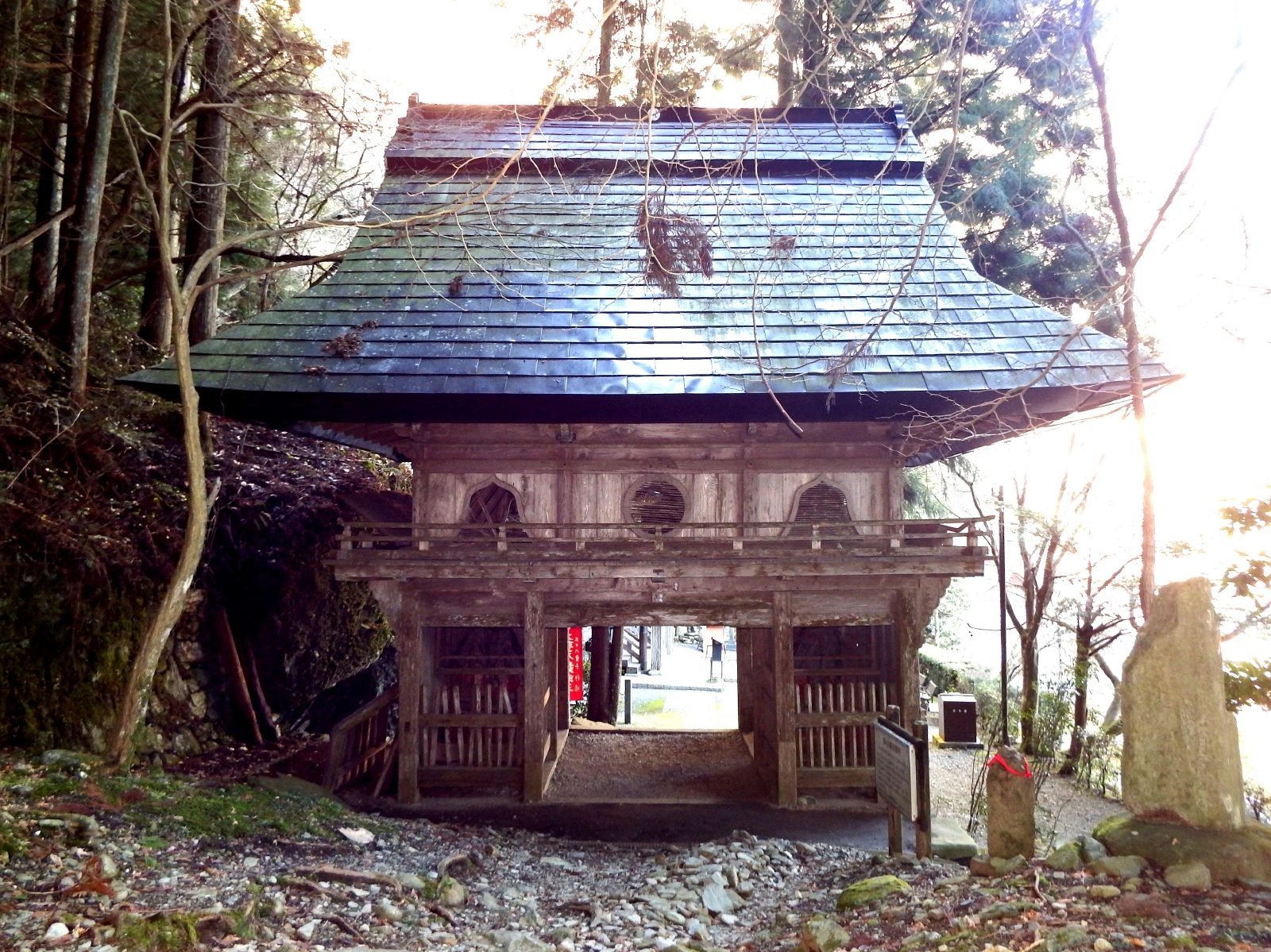 岩屋寺の仁王門